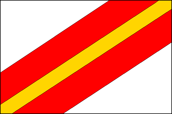 vlajka, Milasín, okres Žďár nad Sázavou